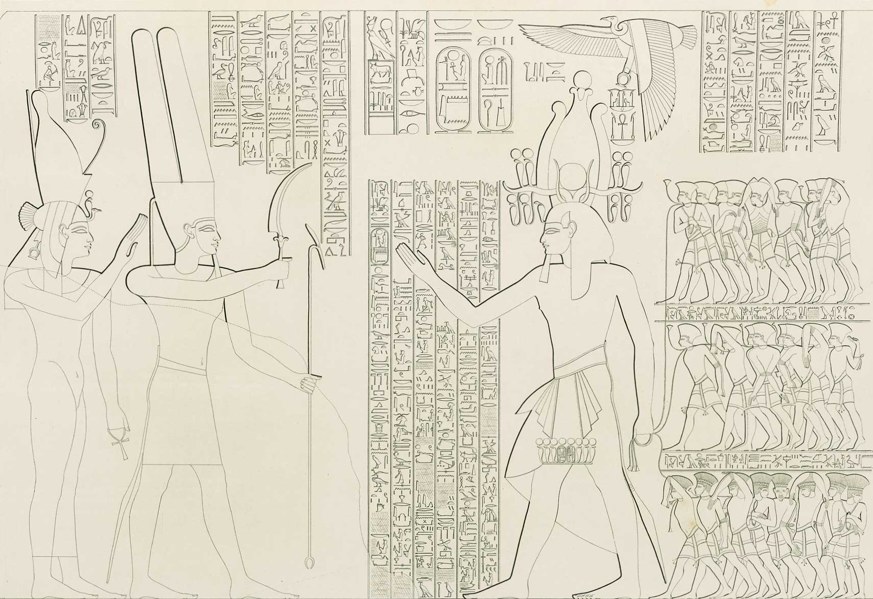 König Ramses III. führt Gefangene der Seevölker vor die Götter Amun und Mut, Relief im ersten Innenhof am zweiten Pylon des Totentempels Ramses’ III. in Medinet Habu, Ägypten